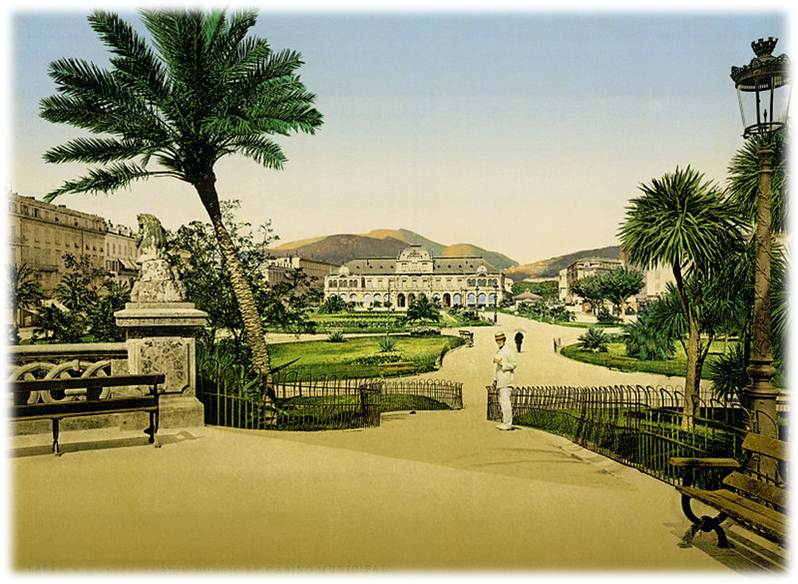 Peinture illustrant la place Masséna vu du jardin public à la fin du XIXe siècle